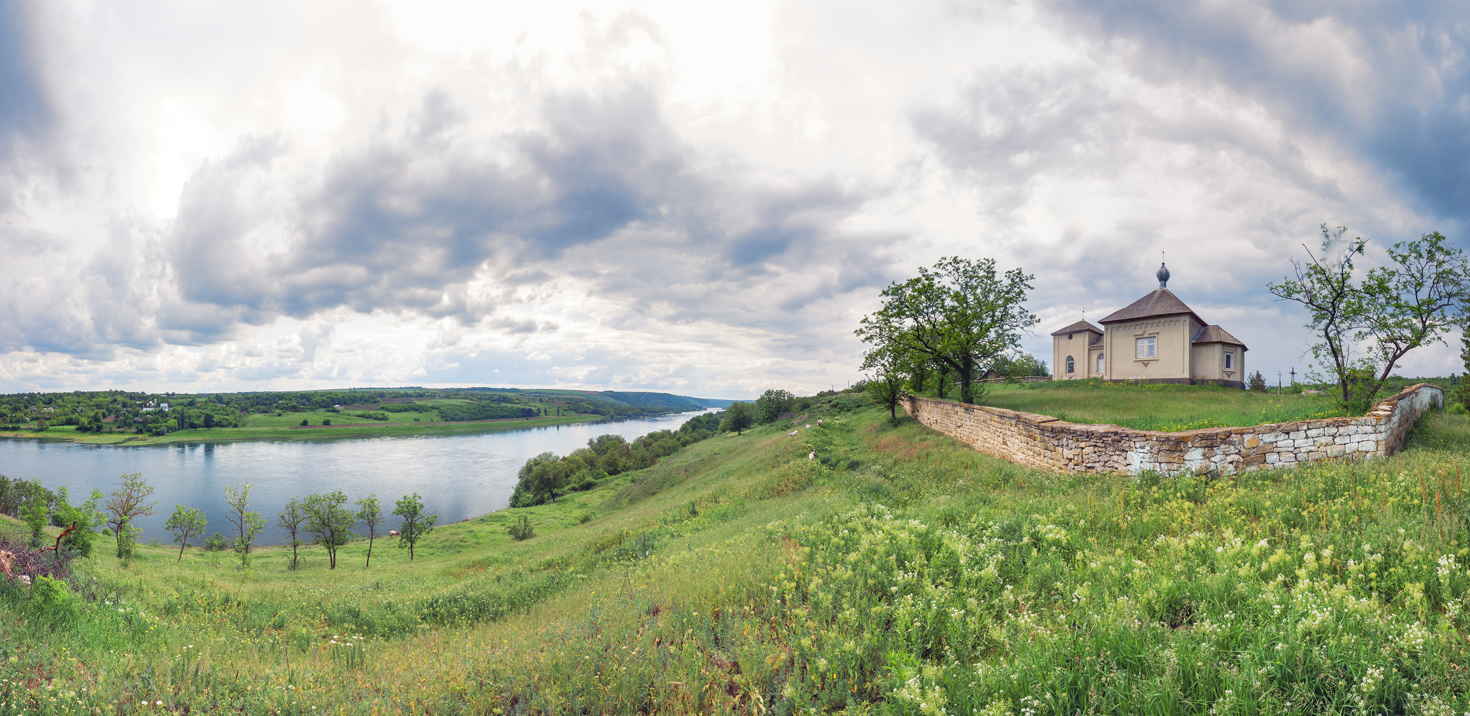 «Дністер», м. Могилів-Подільський — 1629,03 га. Могилів-Подільський район; Бронницька, Ярузька, Суботівська с/р — 3420,0 га. Ямпільський район — Бушанська, Гальжбіївська, Михайлівська с/р — 1670,45 га.